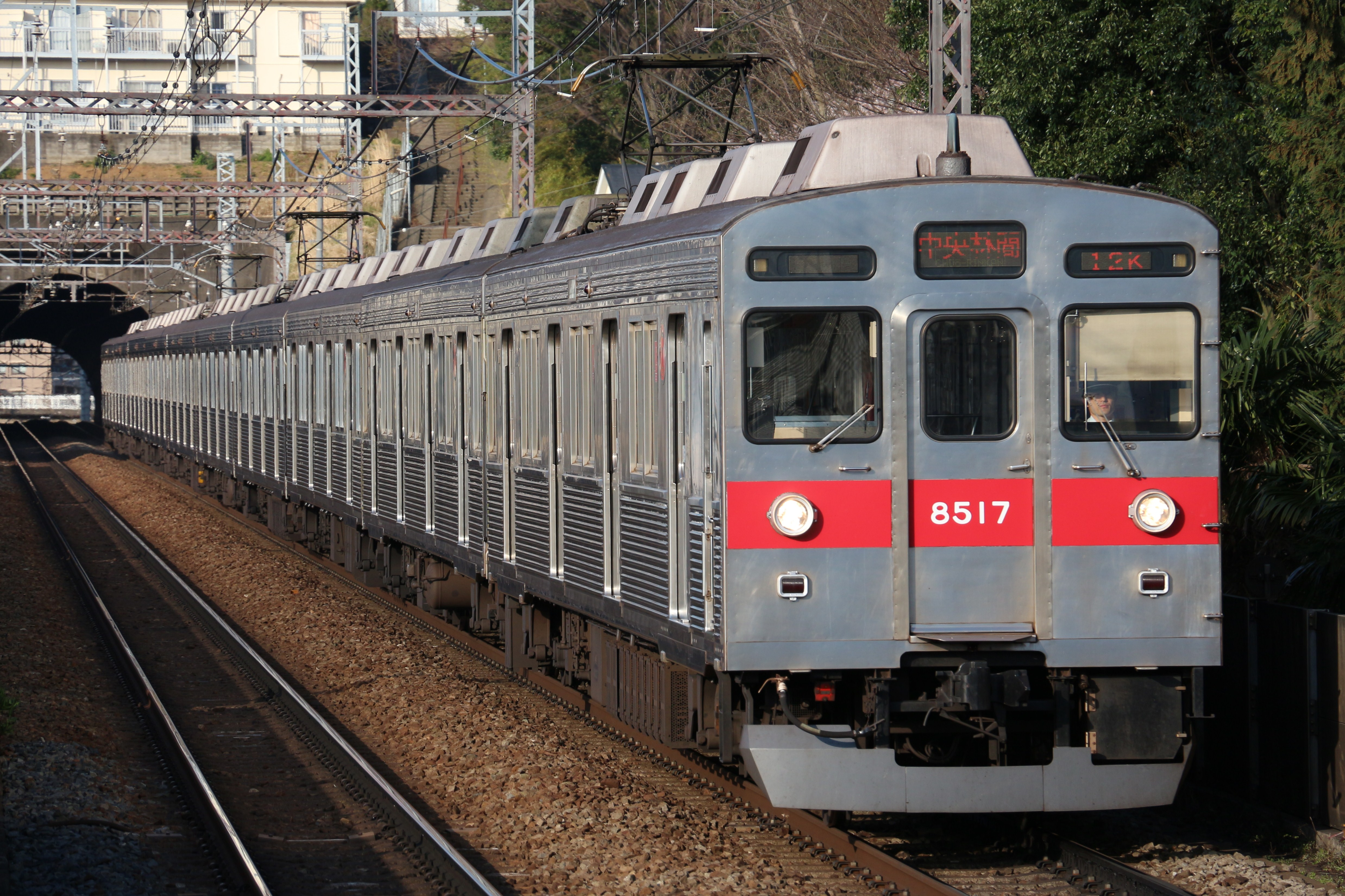 東急電鉄8500系8617編成 田奈駅にて撮影